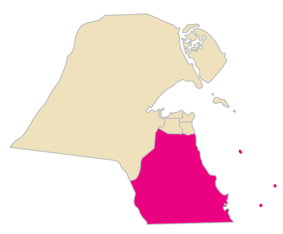 Al Ahmadi